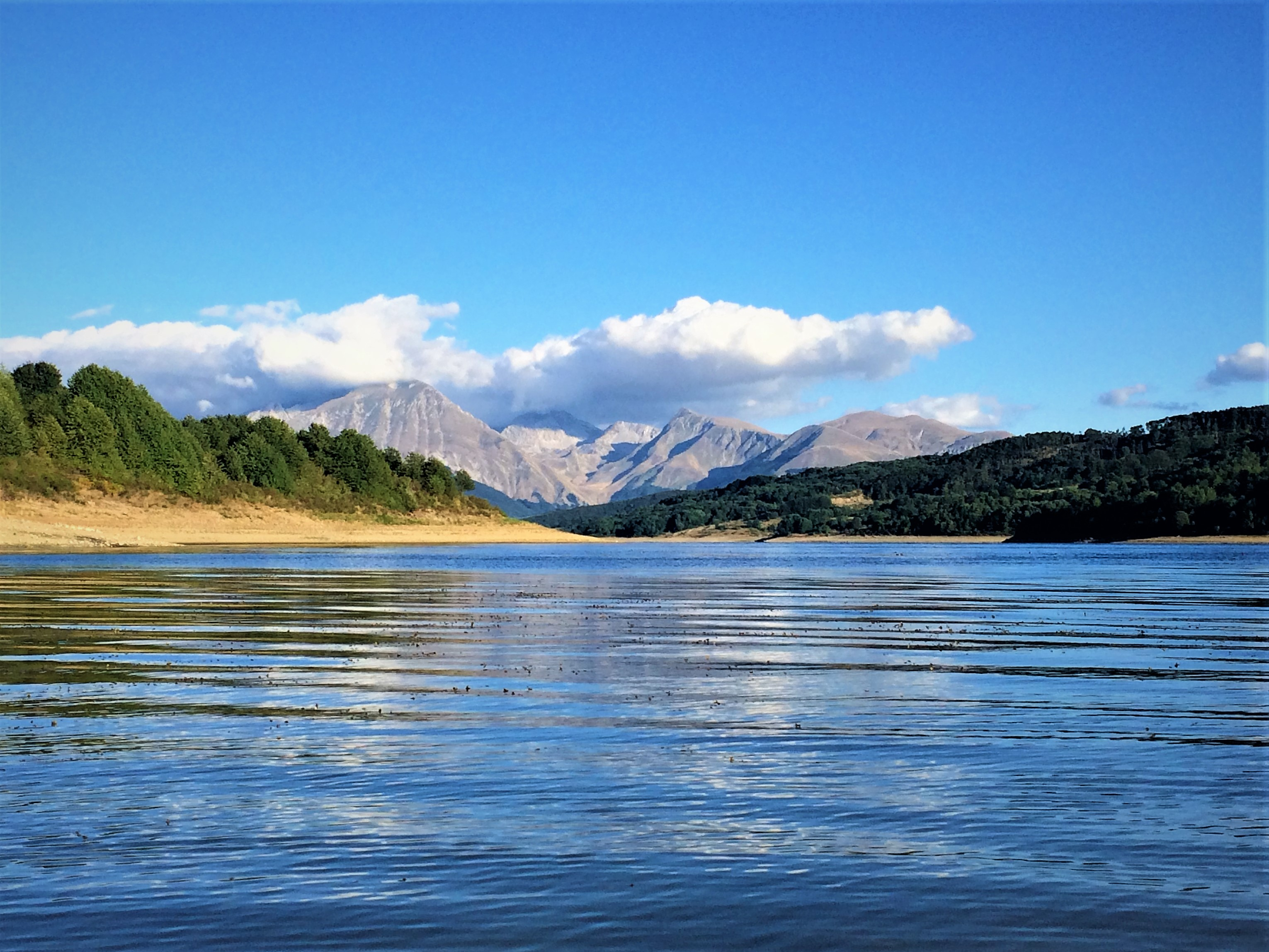 Lago di Campotosto nell'agosto 2017.